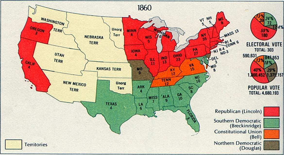 Verteilung der Wahlmänner nach der Präsidentschaftswahl in den USA 1860 (Sieger: Lincoln)